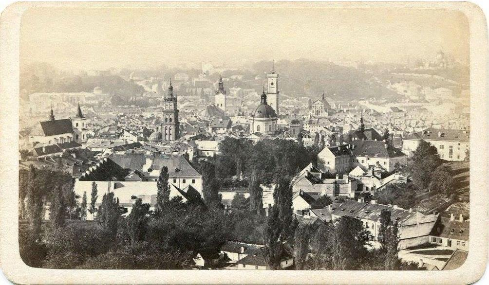 Lwów, widok z Kopca na miasto.